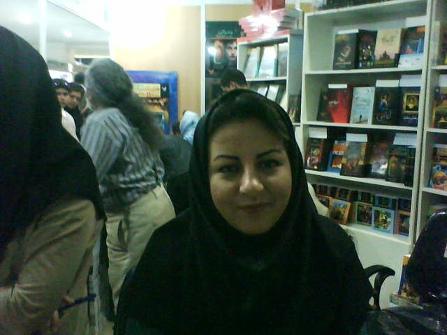 ویدا اسلامیه در ۲۲مین نمایشگاه بین‌المللی کتاب تهران